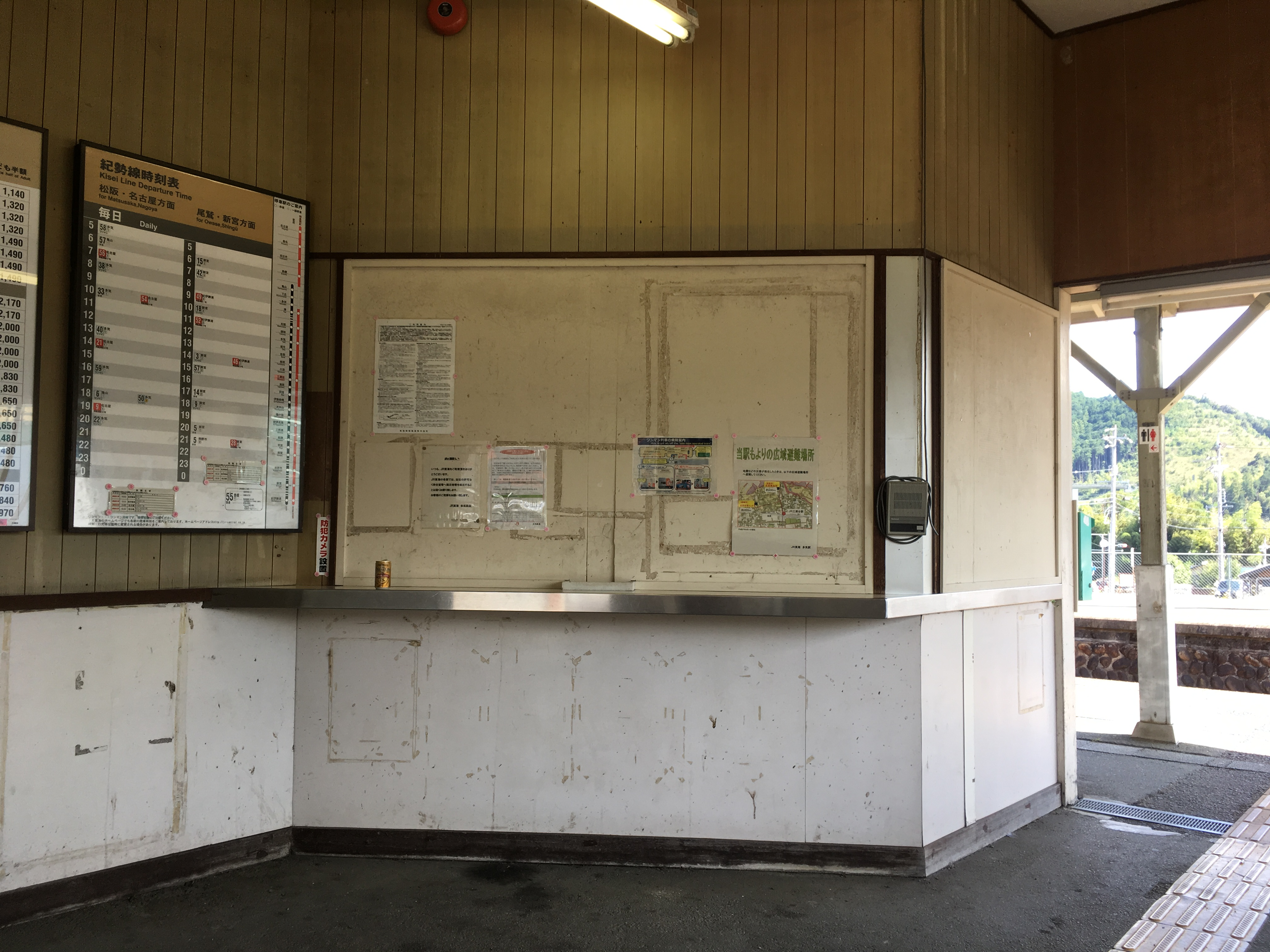 2017年9月